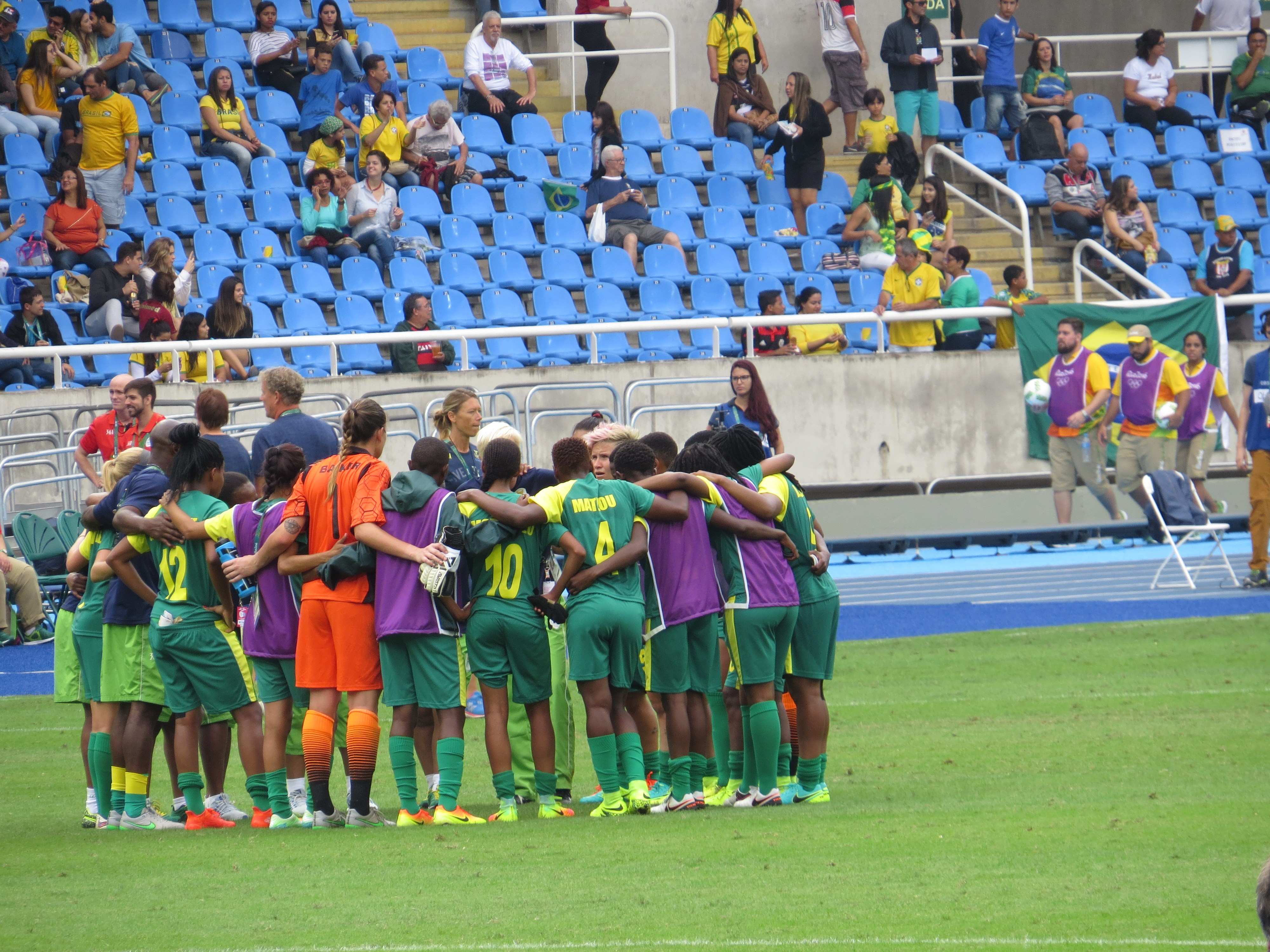 Futebol feminino Suécia 1 x0 Africa do Sul 03/08/16